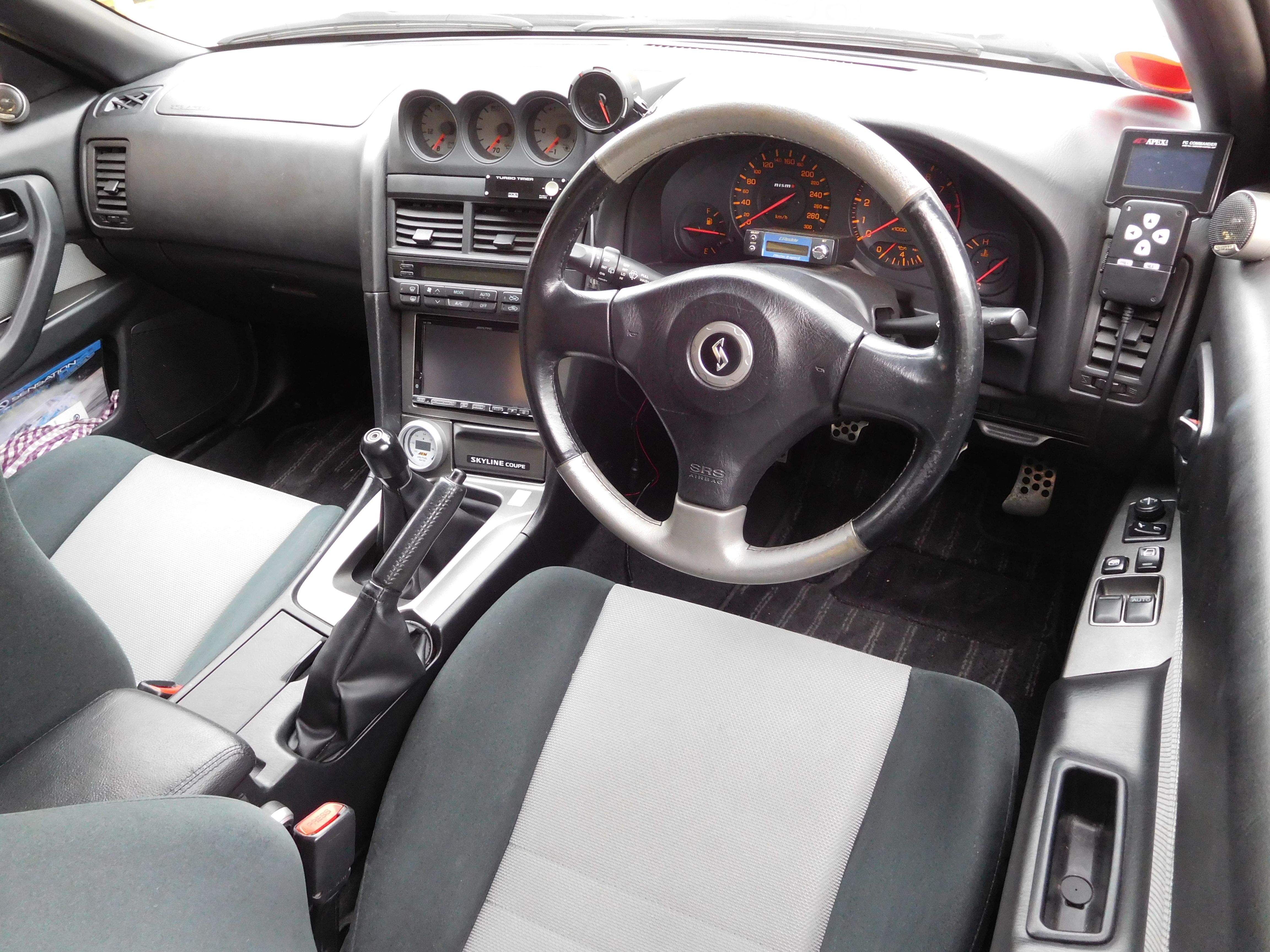 Intérieur d'une Nissan Skyline R34 avec volant à droite.